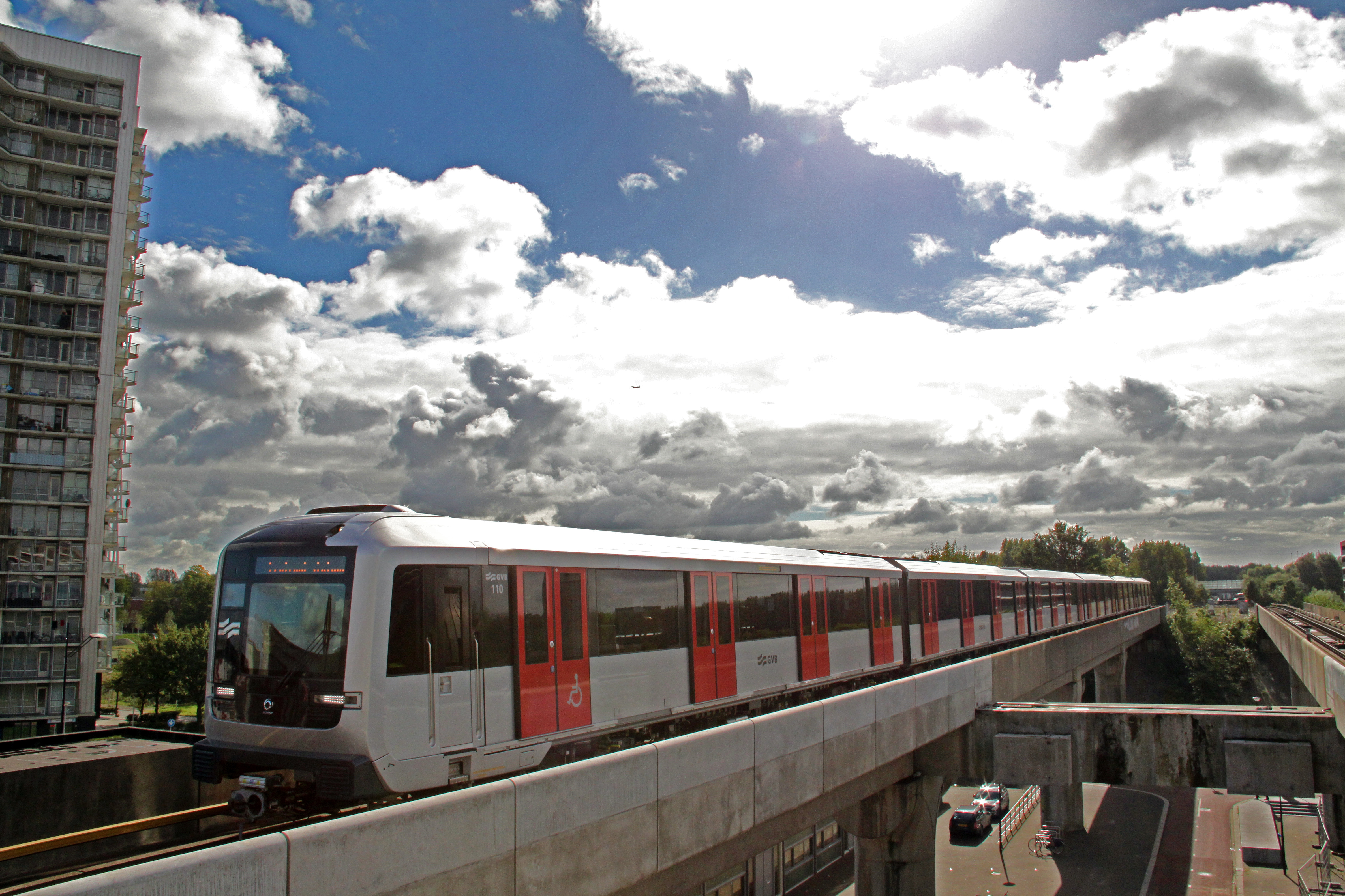 Een metrostel uit de serie M5 komt tijdens de perspresentatie voor dit materieeltype aangereden op station Kraaiennest.